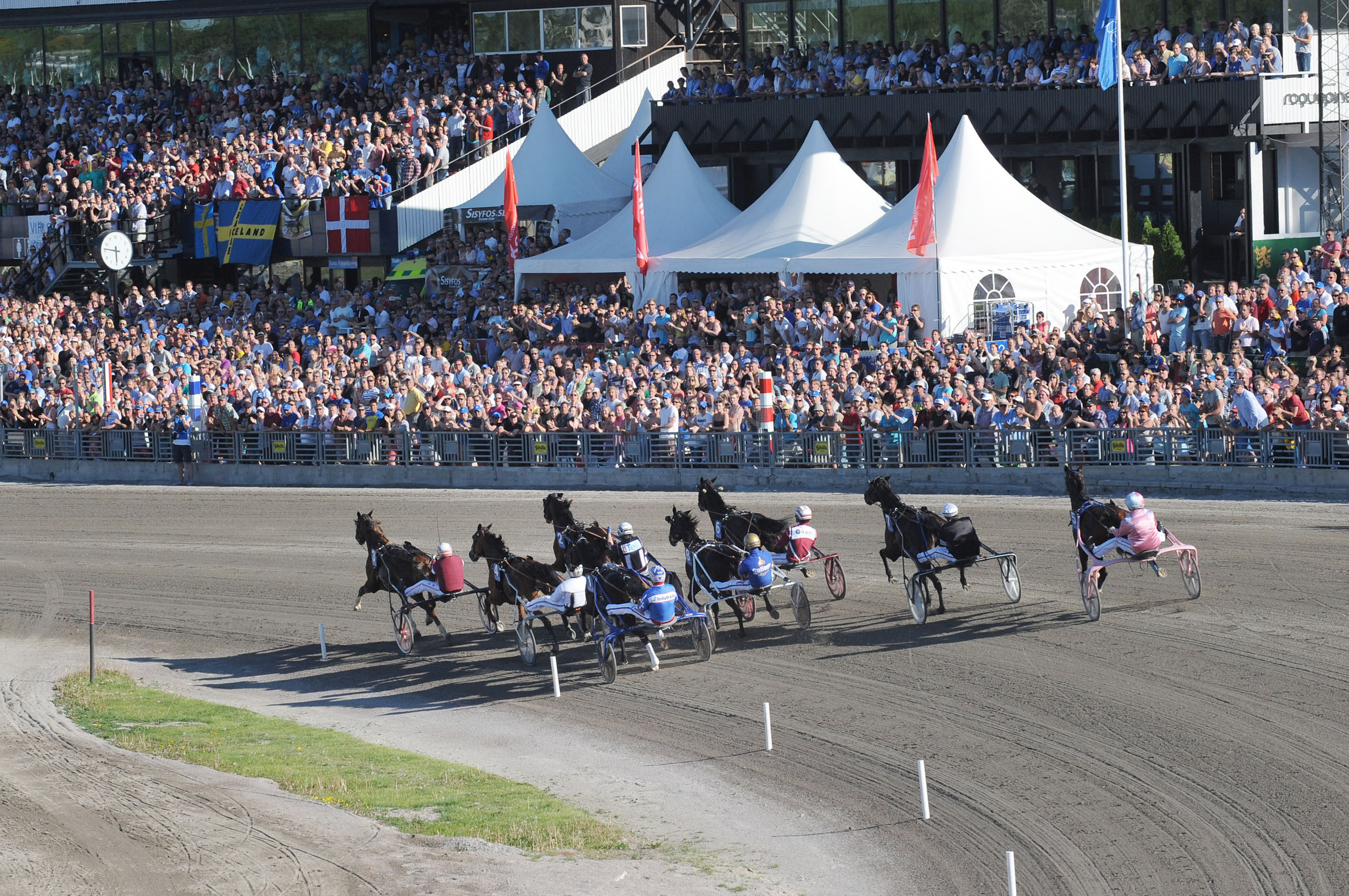 200 meter kvar till mål för Elitloppsfinalen 2012 på Solvalla. Ekipage: 1. Brioni (Joakim Lövgren), 2. Yarrah Boko (Ulf Ohlsson), 3. Commander Crowe (Christophe Martens, vinnare), 4. Arch Madness (Brian Sears), 5. Oyonnax (Kenneth Nielsson), 6. Sebastian K. (Lutfi Kolgjini), 7. Rapide Lebel (Eric Raffin) och 8. Classic Grand Cru (Björn Goop).